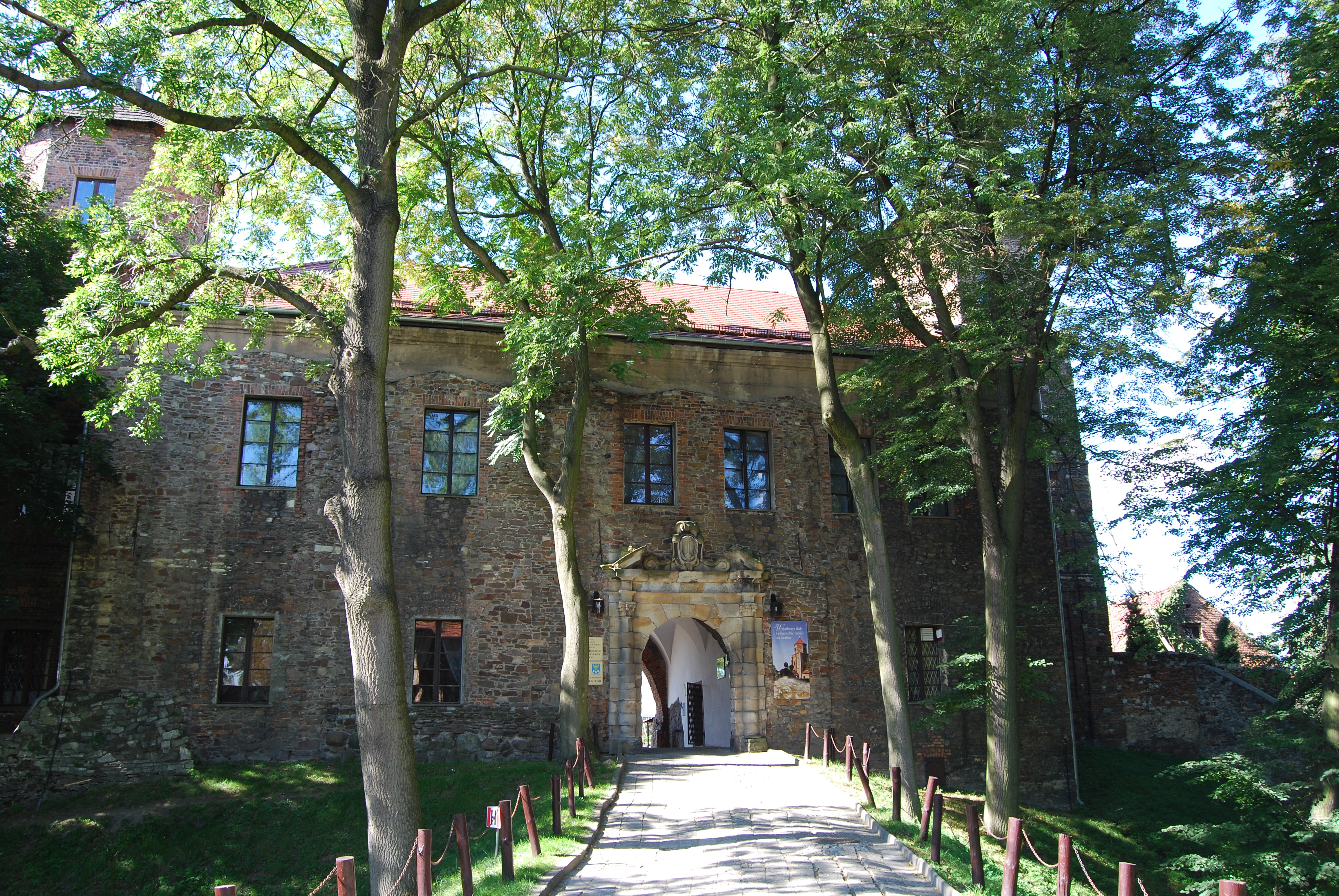 Toszek - zamek obronny wraz z fosami, przyległymi ogrodami i całym wzgórzem zamkowym (zabytek nr A/338/60 z 7.03.1960)